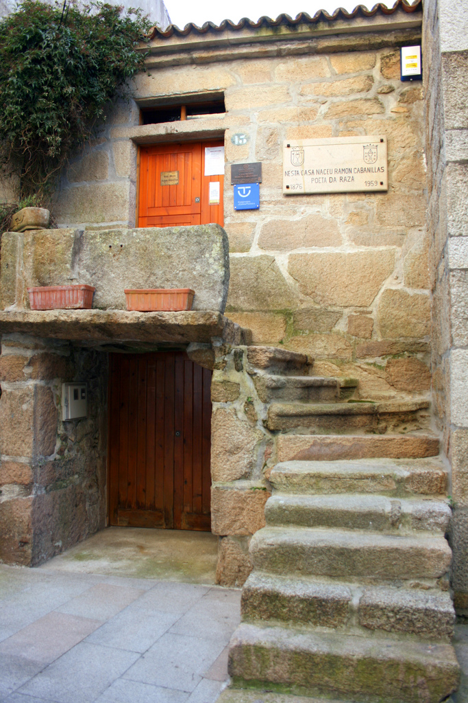 Casa natal de Ramón Cabanillas (Fefiñáns, Cambados).